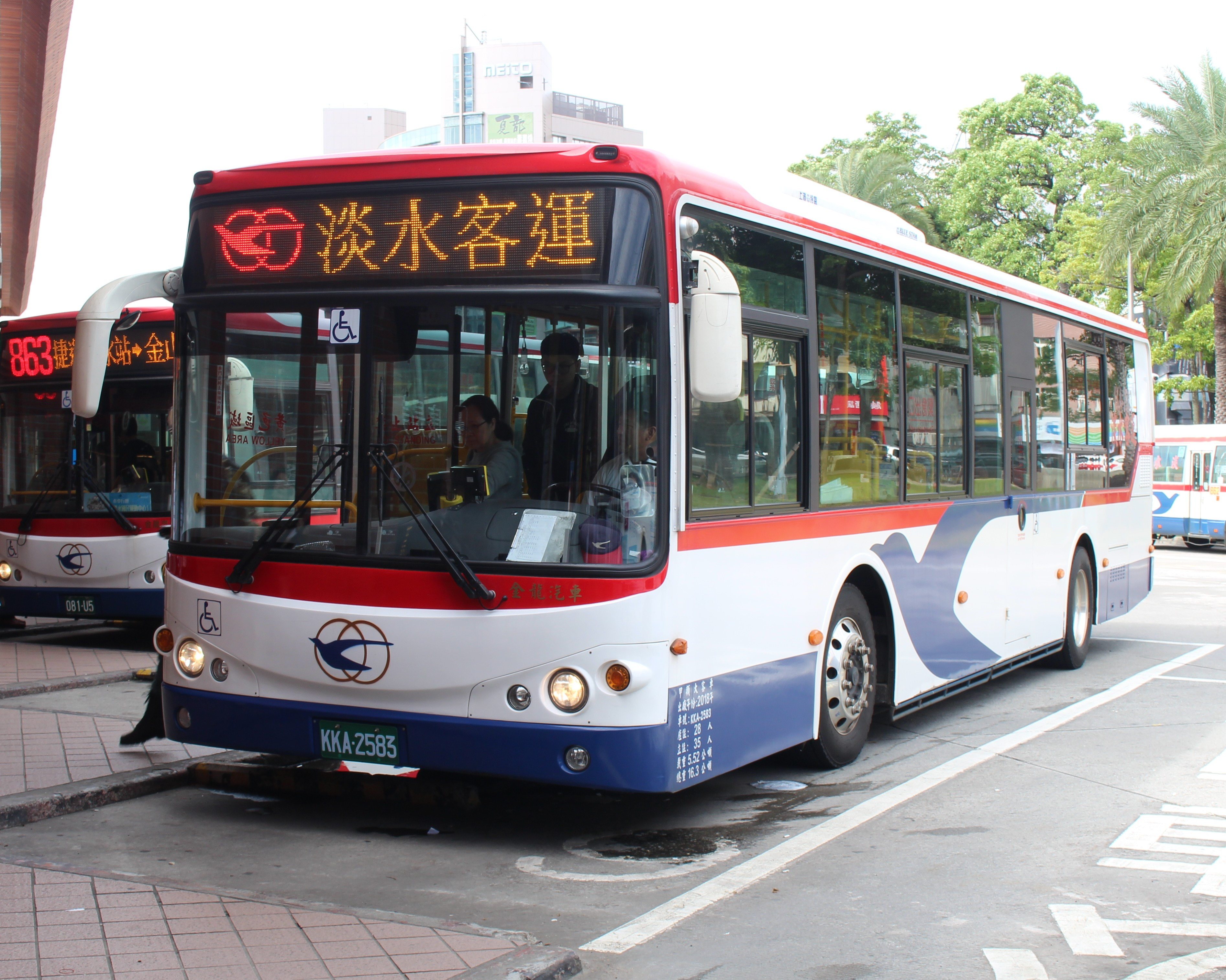 2018 KINGLONG KL6112U1 短軸版